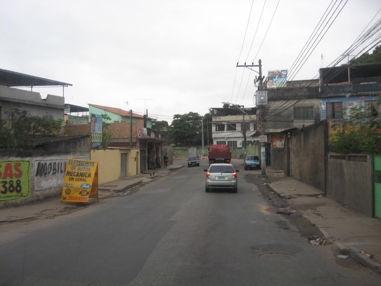 Vista do bairro Vila Norma, em São João de Meriti, RJ.